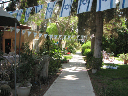 שביל בין בתי המגורים בקיבוץ שדה בוקר ביום העצמאות ה-60 למדינת ישראל, 5/2008 צילום: מיכאלי - שיחה 20:42, 8 במאי 2008 (IDT)